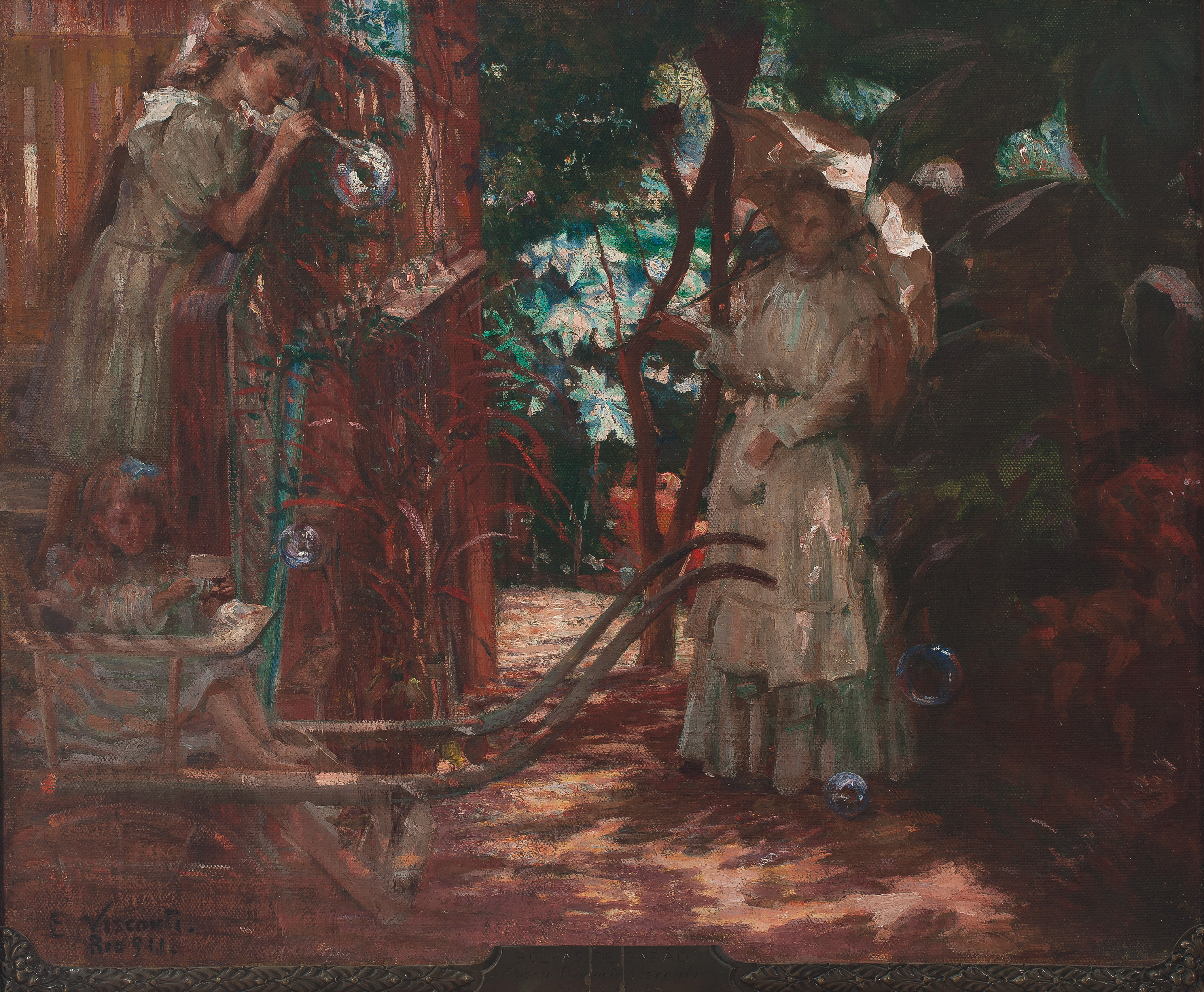 Obra do Projeto Eliseu Visconti